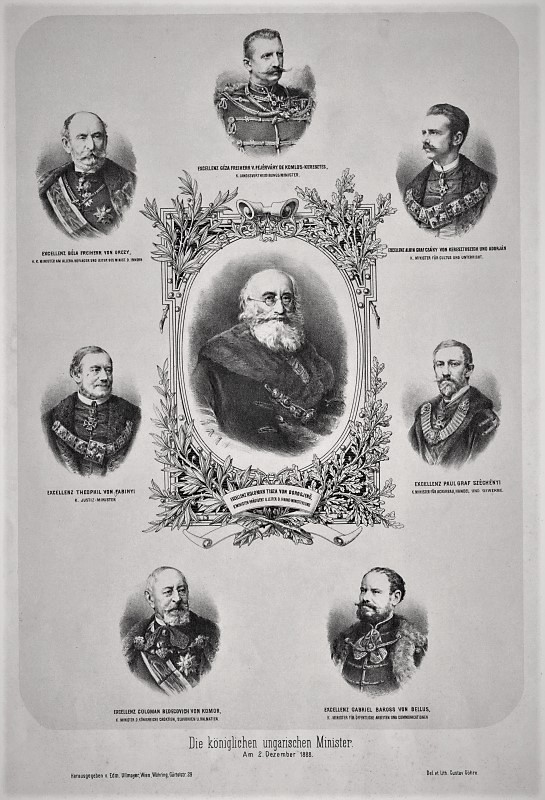 Gruppenbild Personen: Baross, Gábor (1848 - 1892) Bedekovich, Kálmán (1818 - 1889) Csáky-Körösszegh, Albin Graf (1841 - 1912) Orczy von Orczi, Béla Baron (1822 - 1917) Tisza-Borosjenö, Koloman von (1830 - 1902)